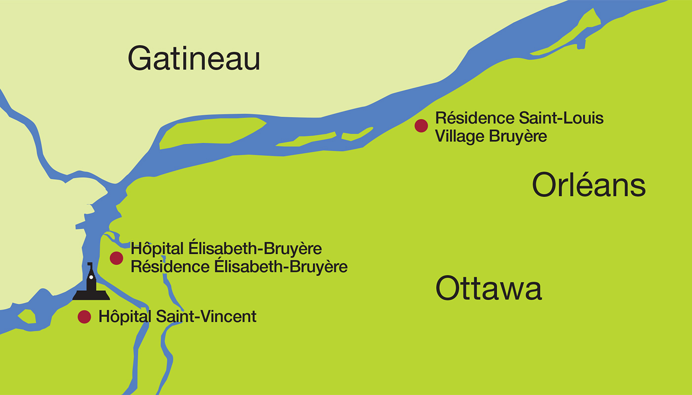 Géolocalisation de Bruyère